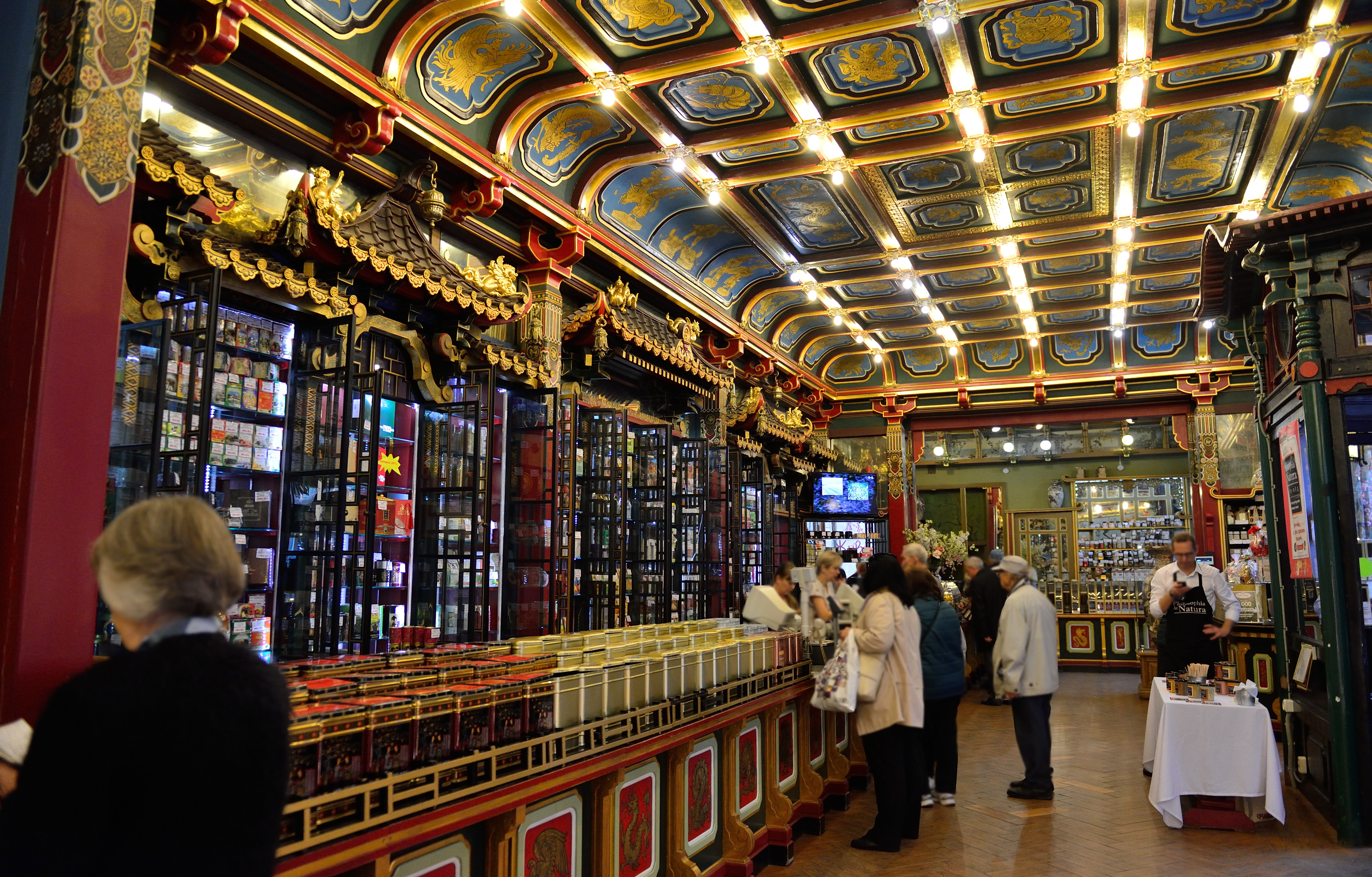 Мясницкая ул., дом 19